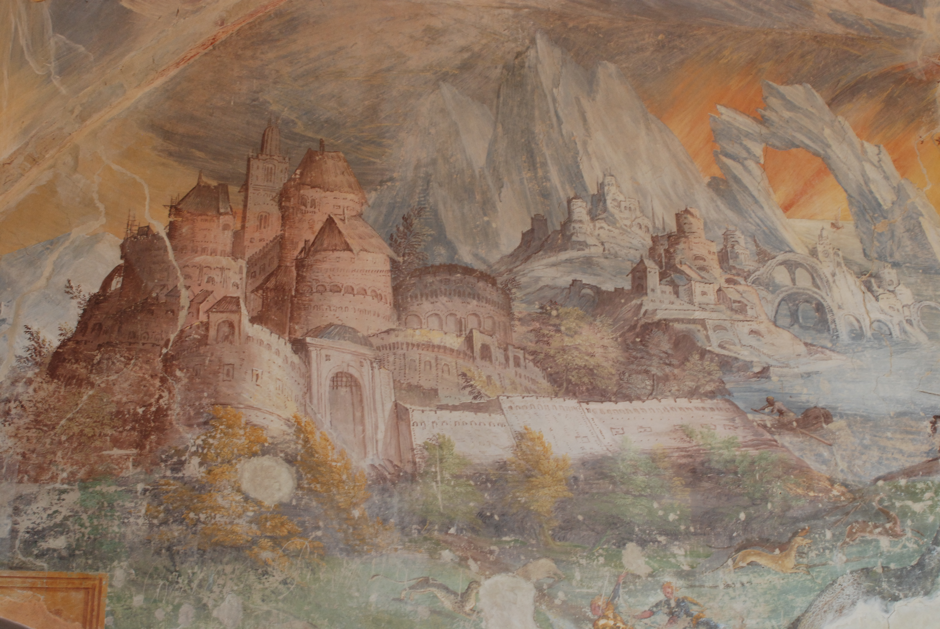 Castello di Torrechiara - MIBAC particolare di un affresco This is a photo of a monument which is part of cultural heritage of Italy.